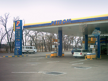 PETROM-Tankstelle (Hermannstadt, Ausfahrt Richtung Mediasch)